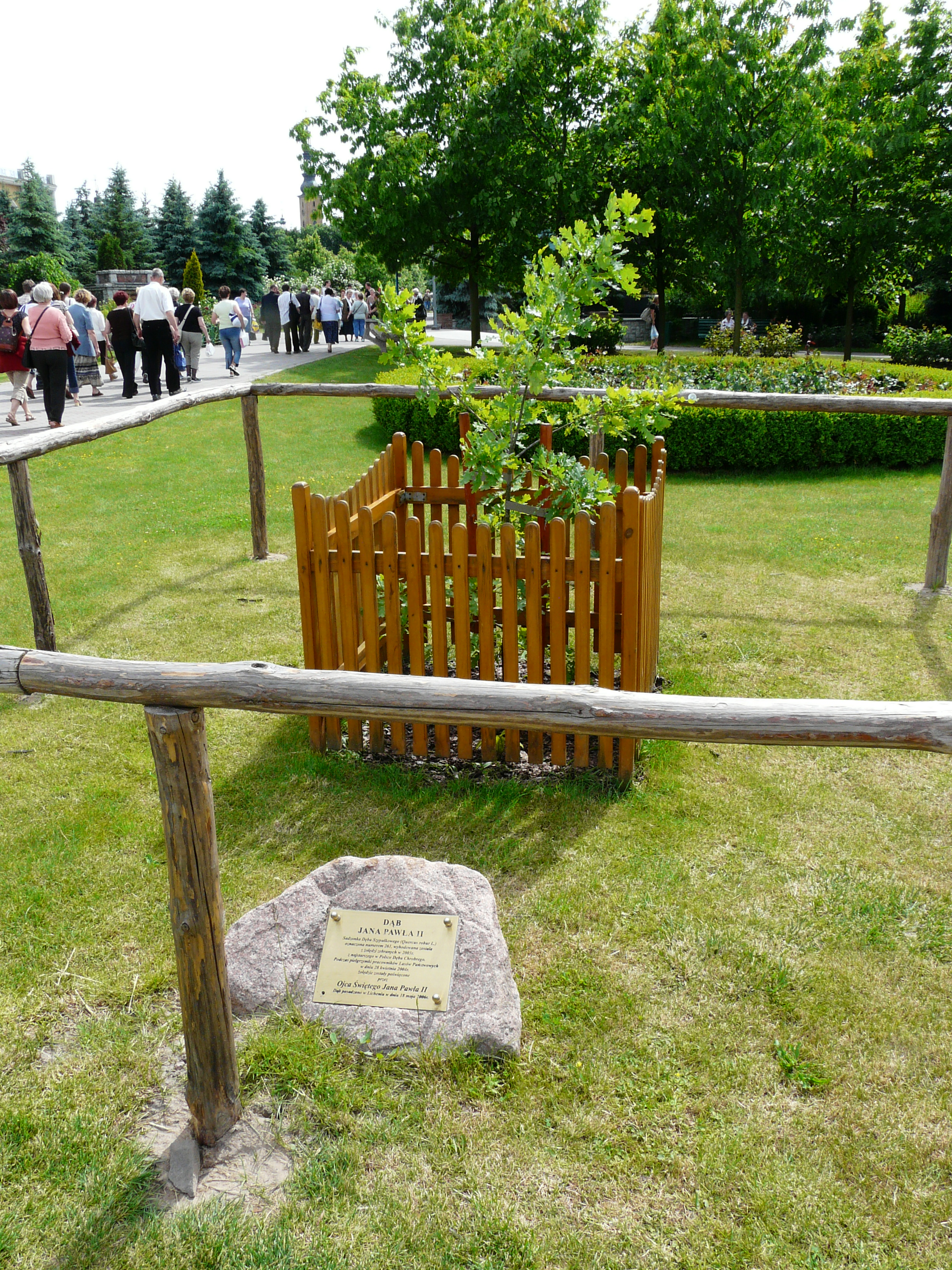 Licheń